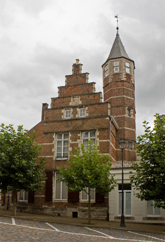 Residentie van de Prins van Nassau, Diest